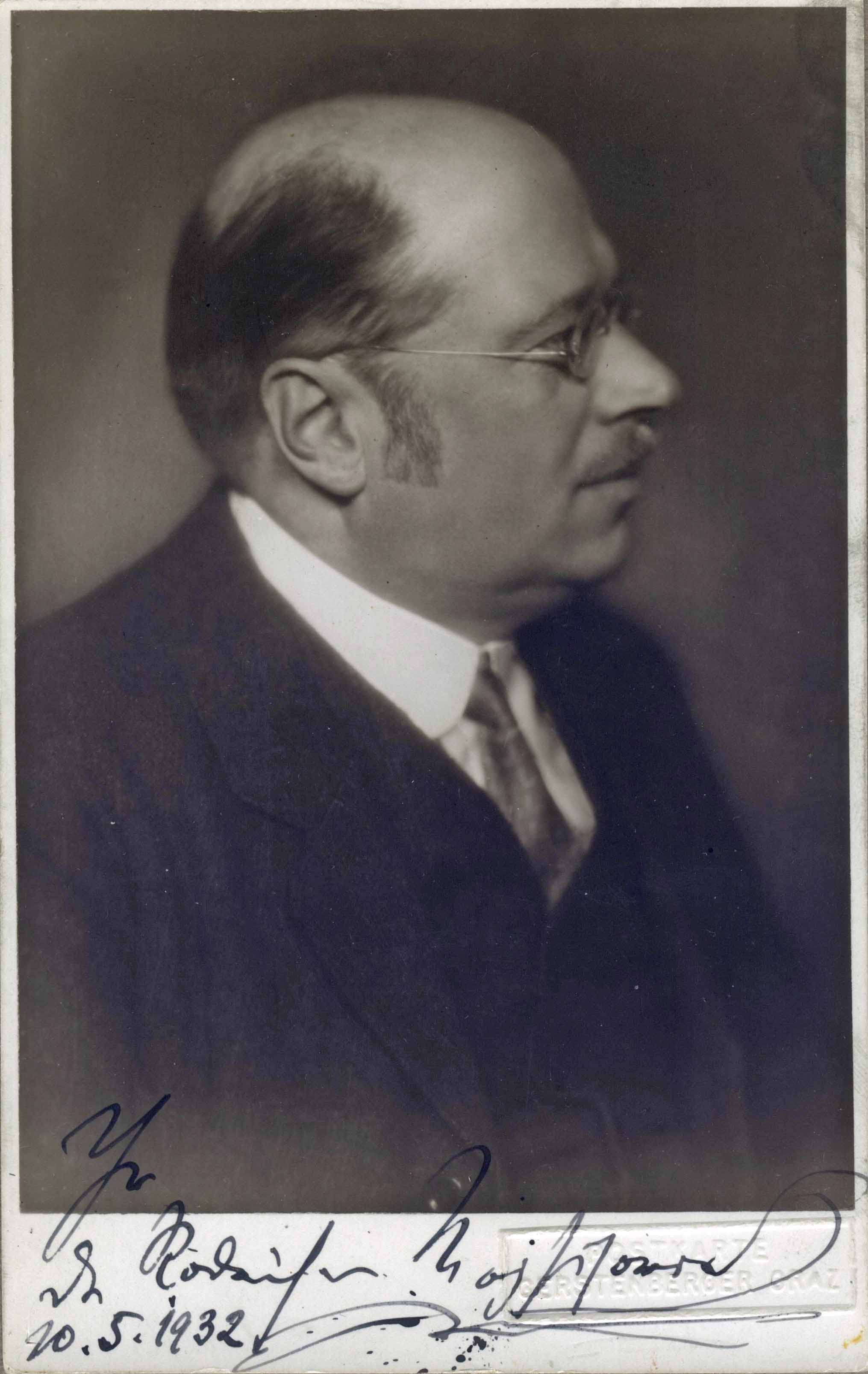 Roderich Mojsisovics von Mojsovár (1877–1953). Fotografie 8,5 × 13,6 cm.